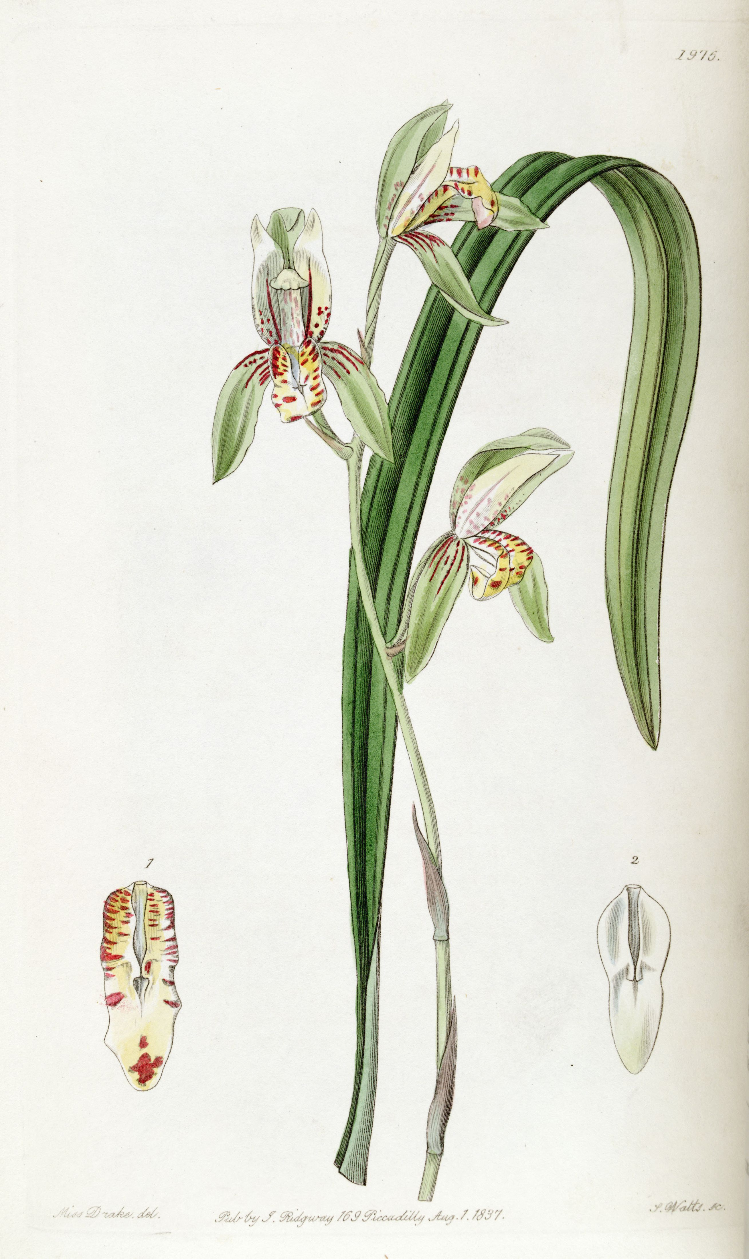 Cymbidium ensifolium (as syn. Cymbidium ensifolium var. estriatum)